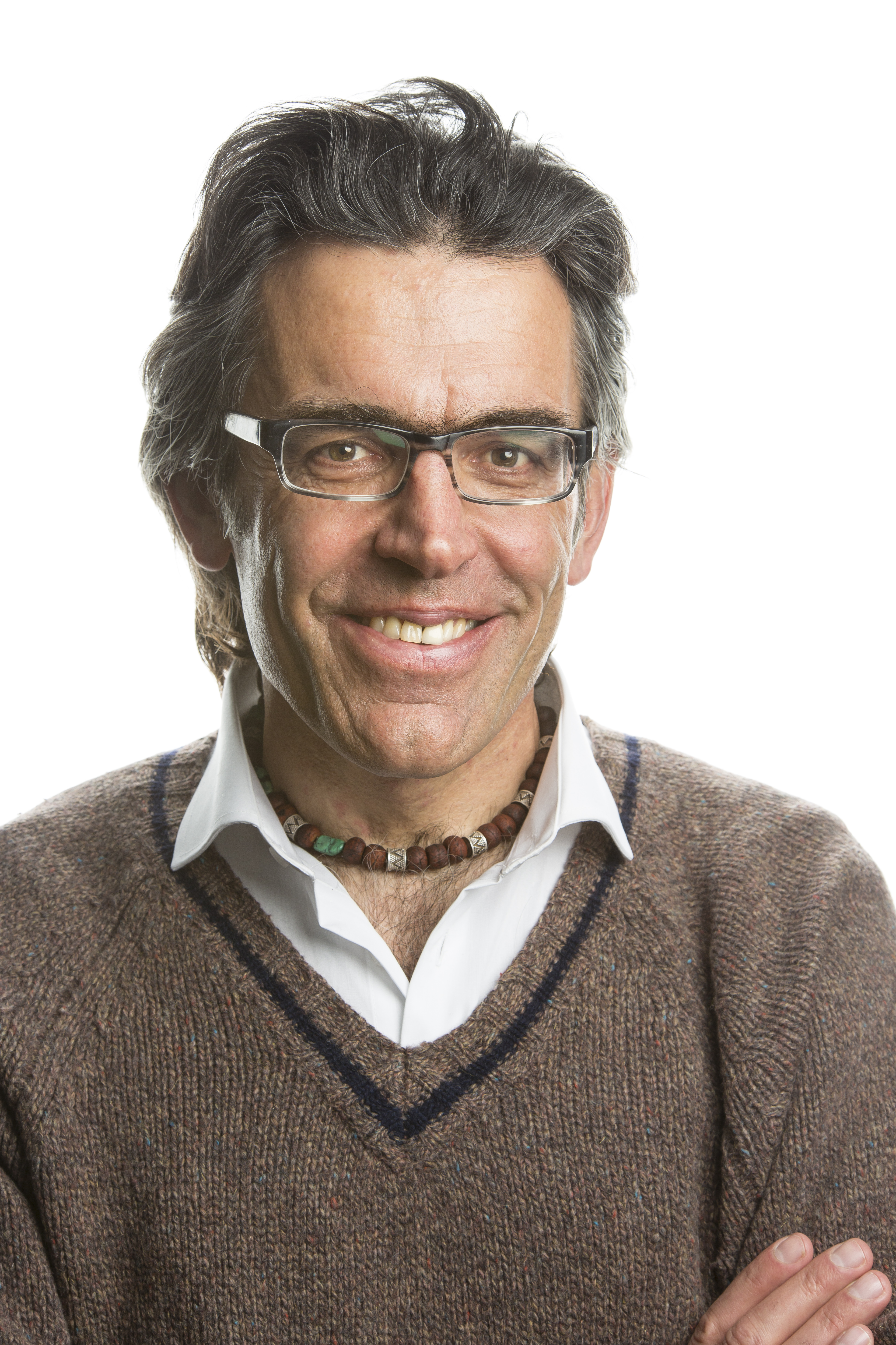 Wilfried Meichtry, fotografiert von Robert Hofer.